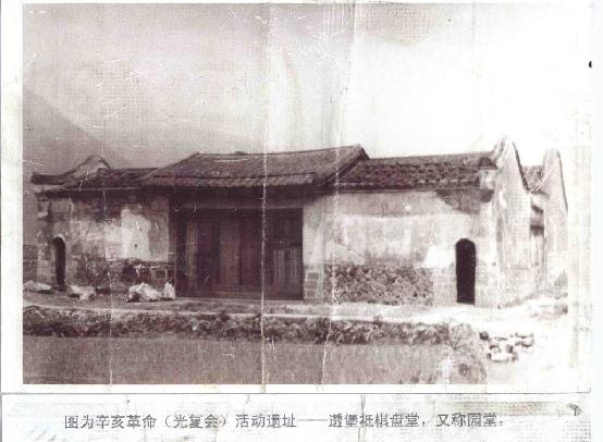 连江光复会旧址